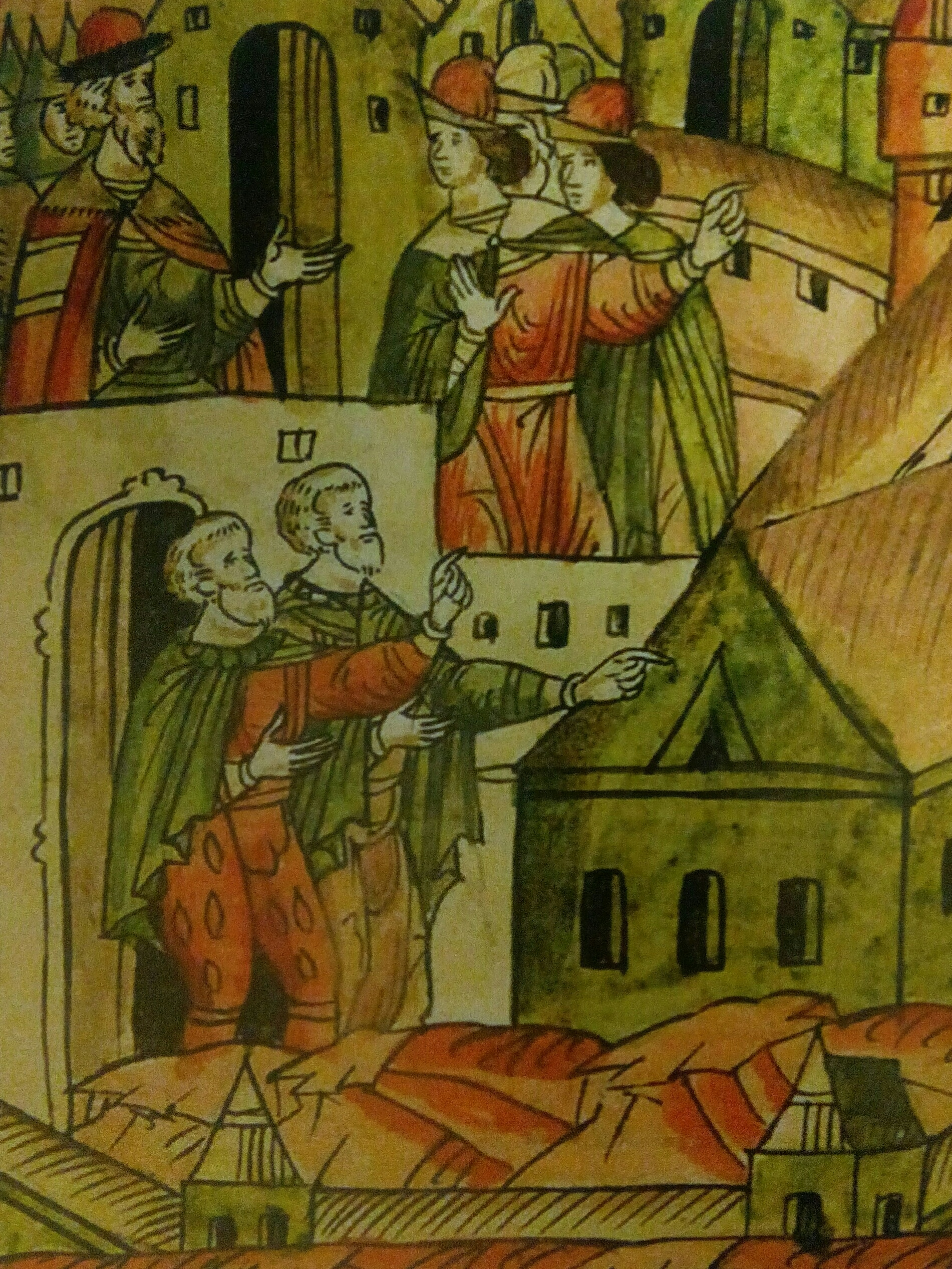 Зодчие Пьетро Антонио Солари и Марко Руффо (внизу). Фрагмент миниатюры Лицевого летописного свода.